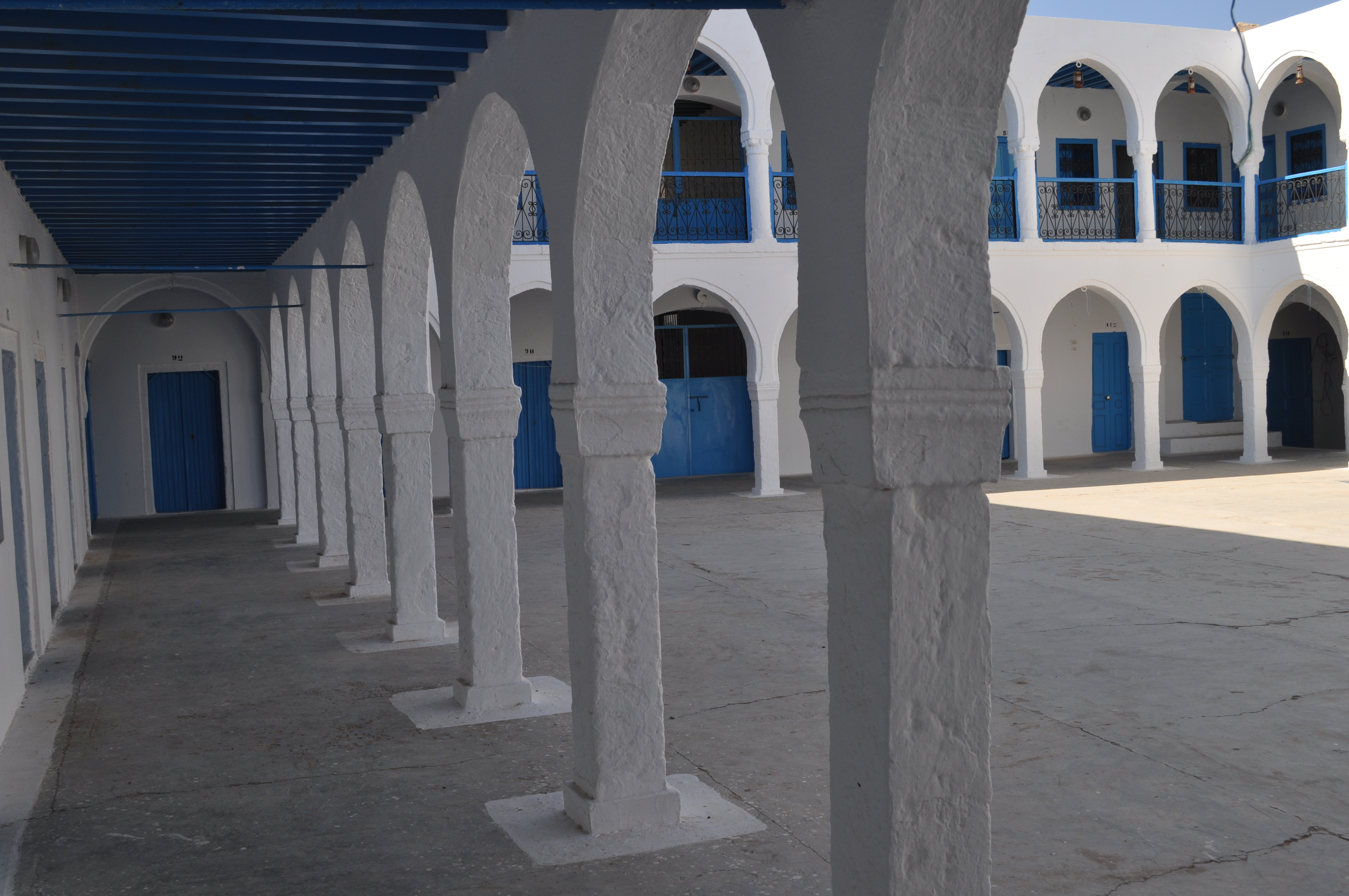 Synagogue de la Hara-Srira